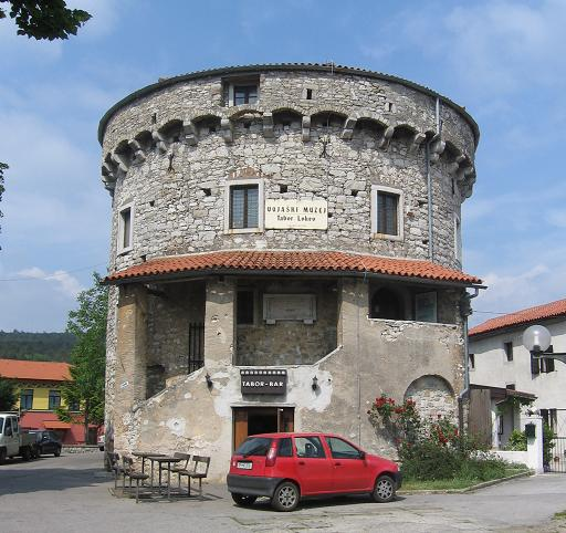 Defense tower in Lokev (near Sežana, Slovenia)